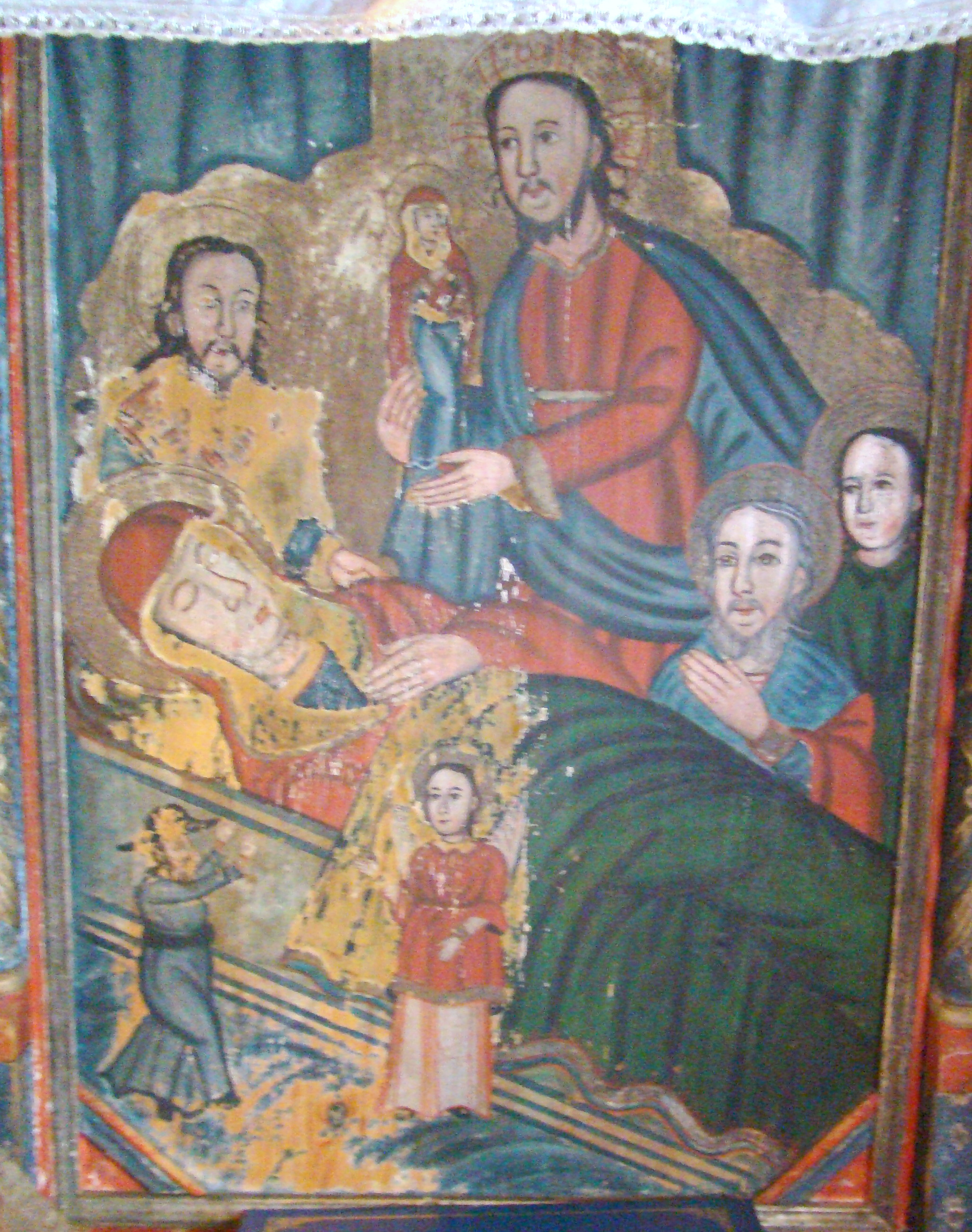 Icoana de hram: „Adormirea Maicii Domnului” . Biserica de lemn din Purcăreț, comuna Letca, județul Sălaj